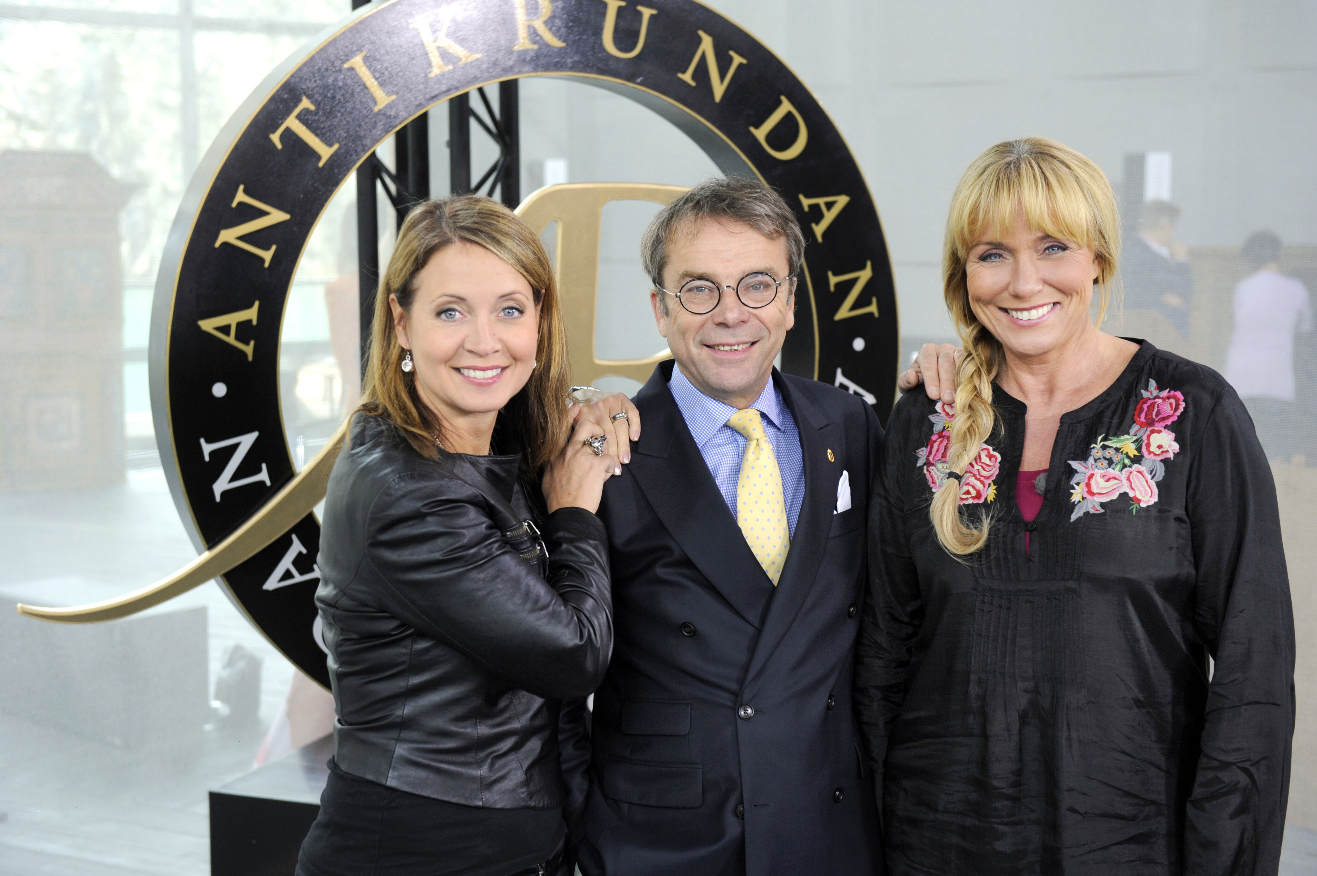 Delar ut gänget bakom Antikrundan i SVT, från vänster: Producenten Pernilla Månsson Colt, experten Knut Knutson och programledaren Anne Lundberg.